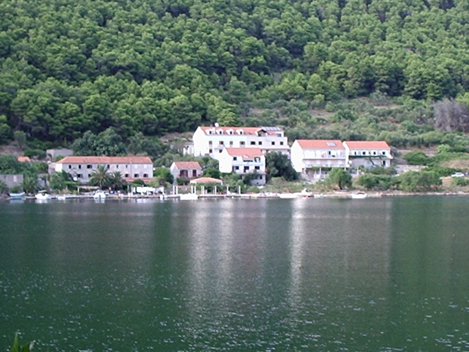 Soline, maleni zaselak na ulazu u Veliko jezero na Mljetu, Hrvatska